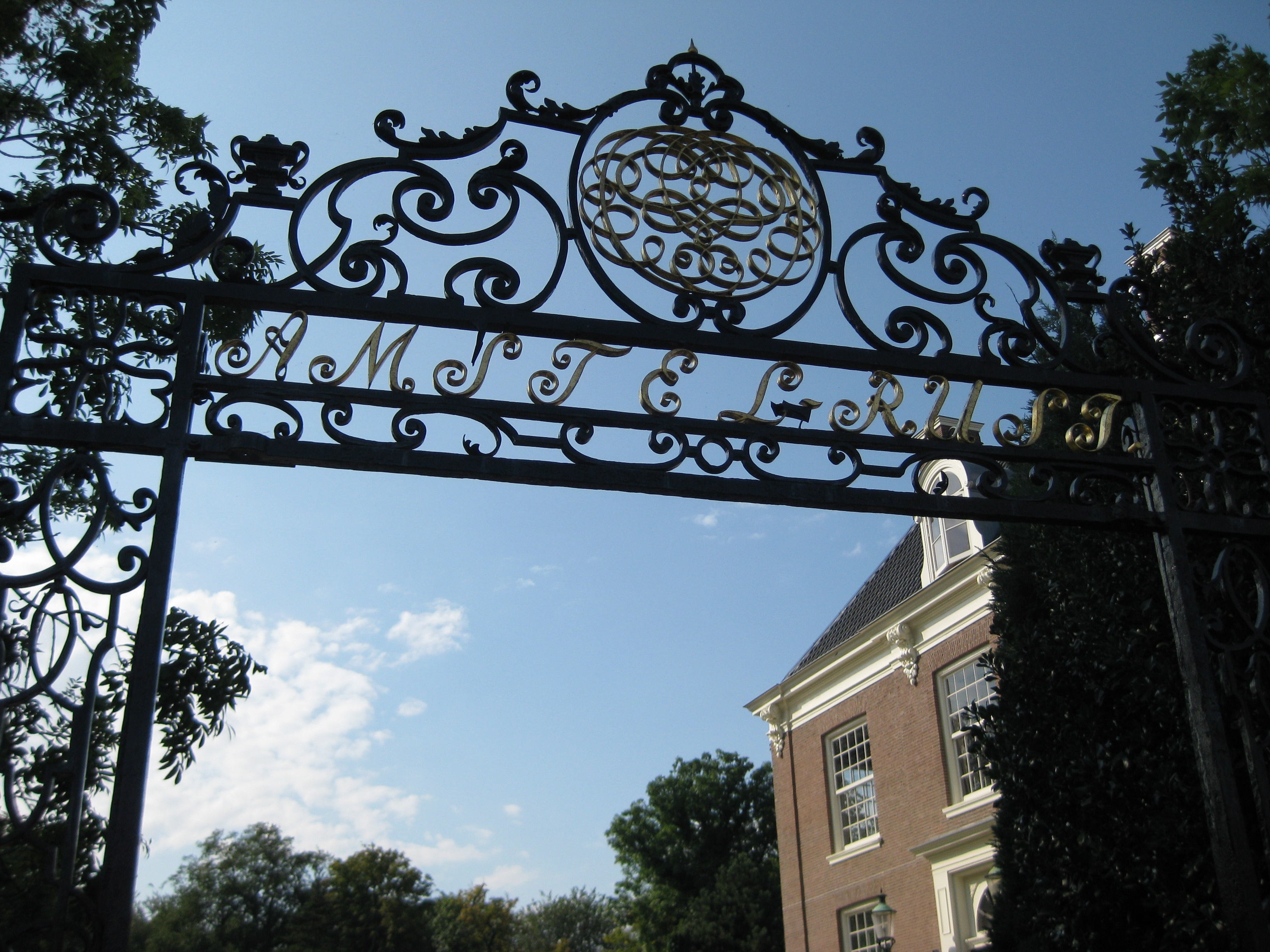 Toegangshek Amstelrust, Amsteldijk, Amsterdam